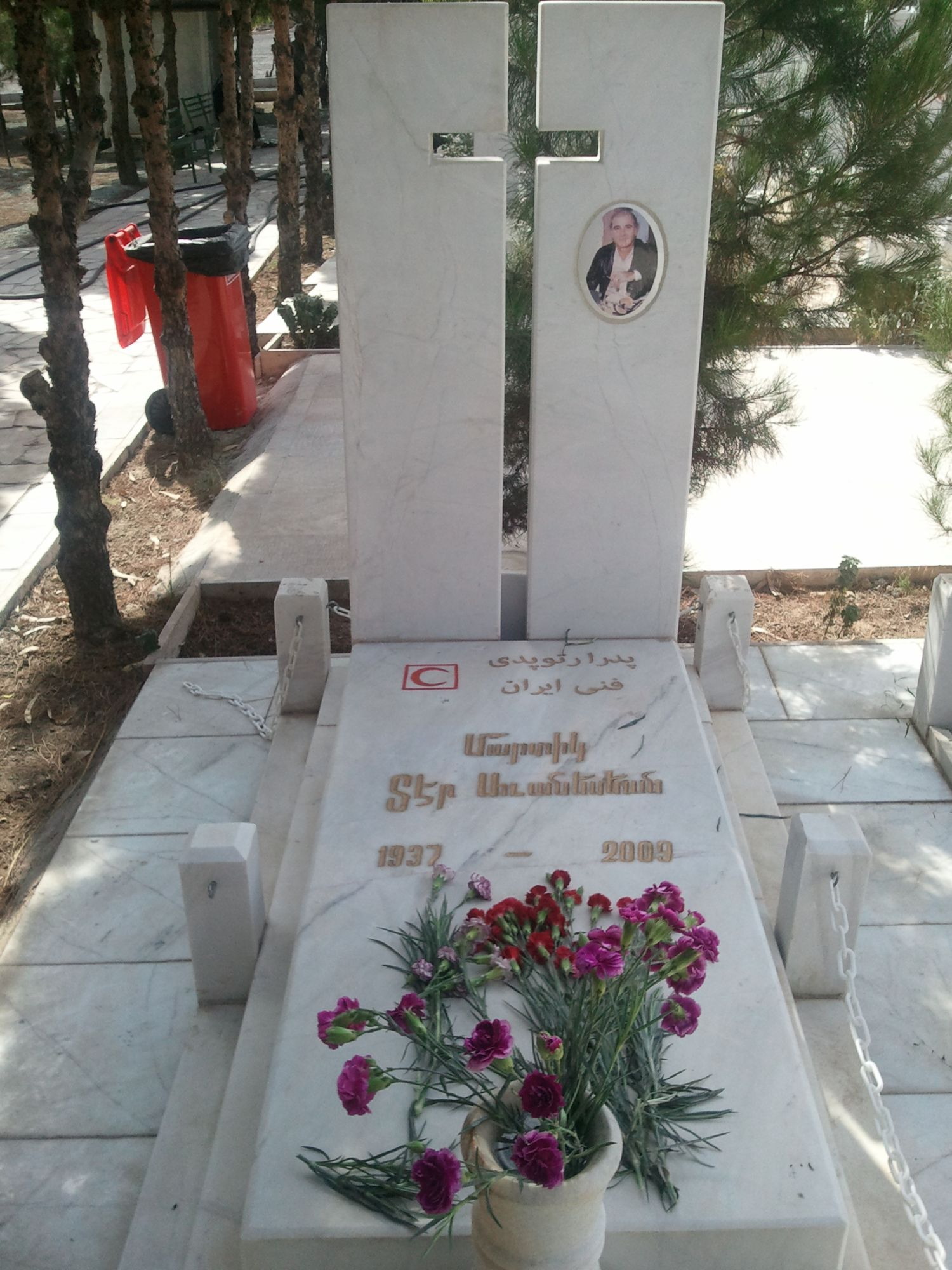 عکس گرفته شده در آرامستان ارامنه در قطعه کشته شدگان سانحه هوائی تهران - ایروان از مزار استاد مارتیک درآوانسیان